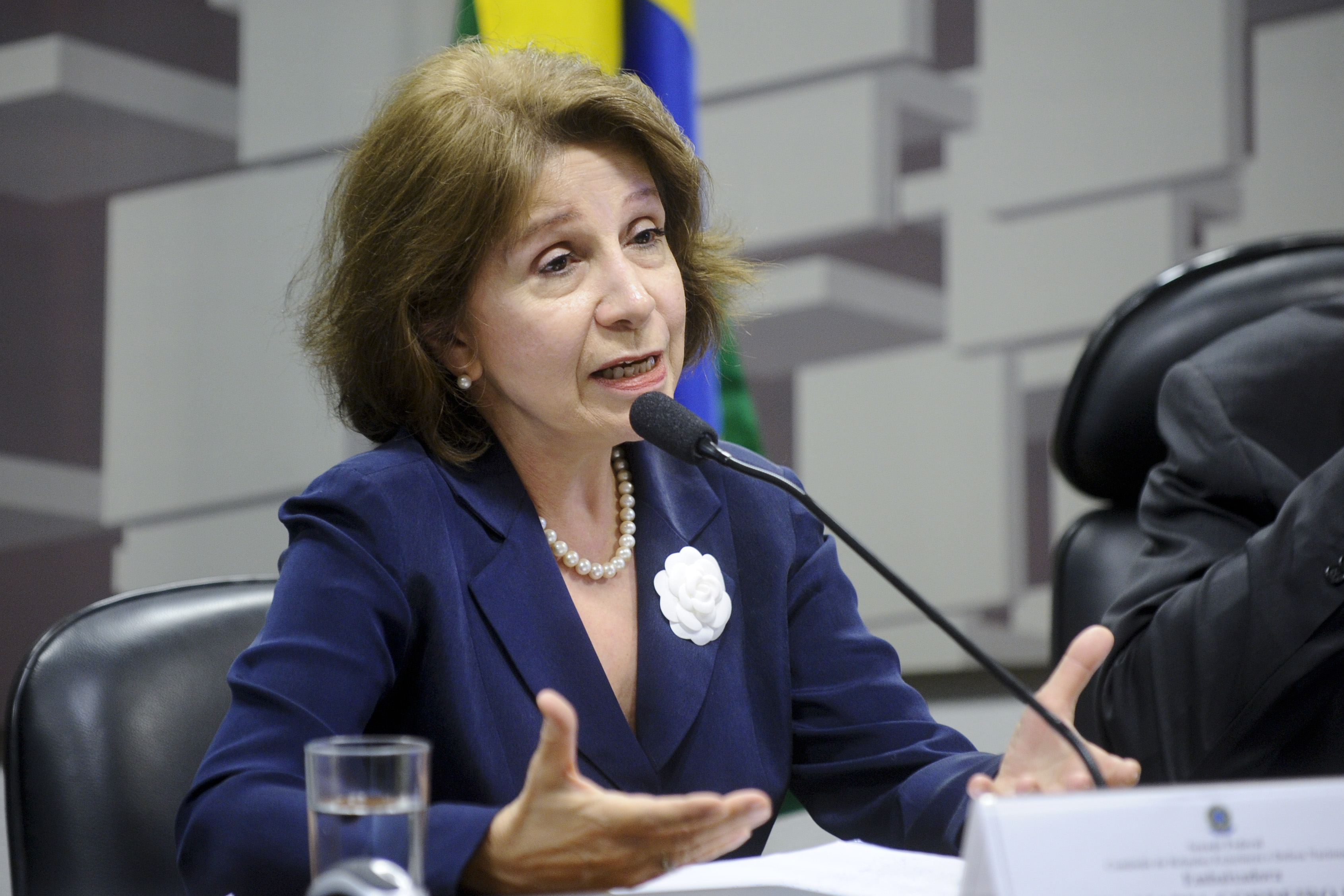 Comissão de Relações Exteriores e Defesa Nacional (CRE) durante sabatina de embaixadores indicados para Reino dos Países Baixos, Canadá, e representante junto à FAO. Também leitura de relatórios de novos indicados. Em pronunciamento, indicado ao Reino dos Países Baixo, Regina Maria Cordeiro. Foto: Marcos Oliveira/Agência Senado